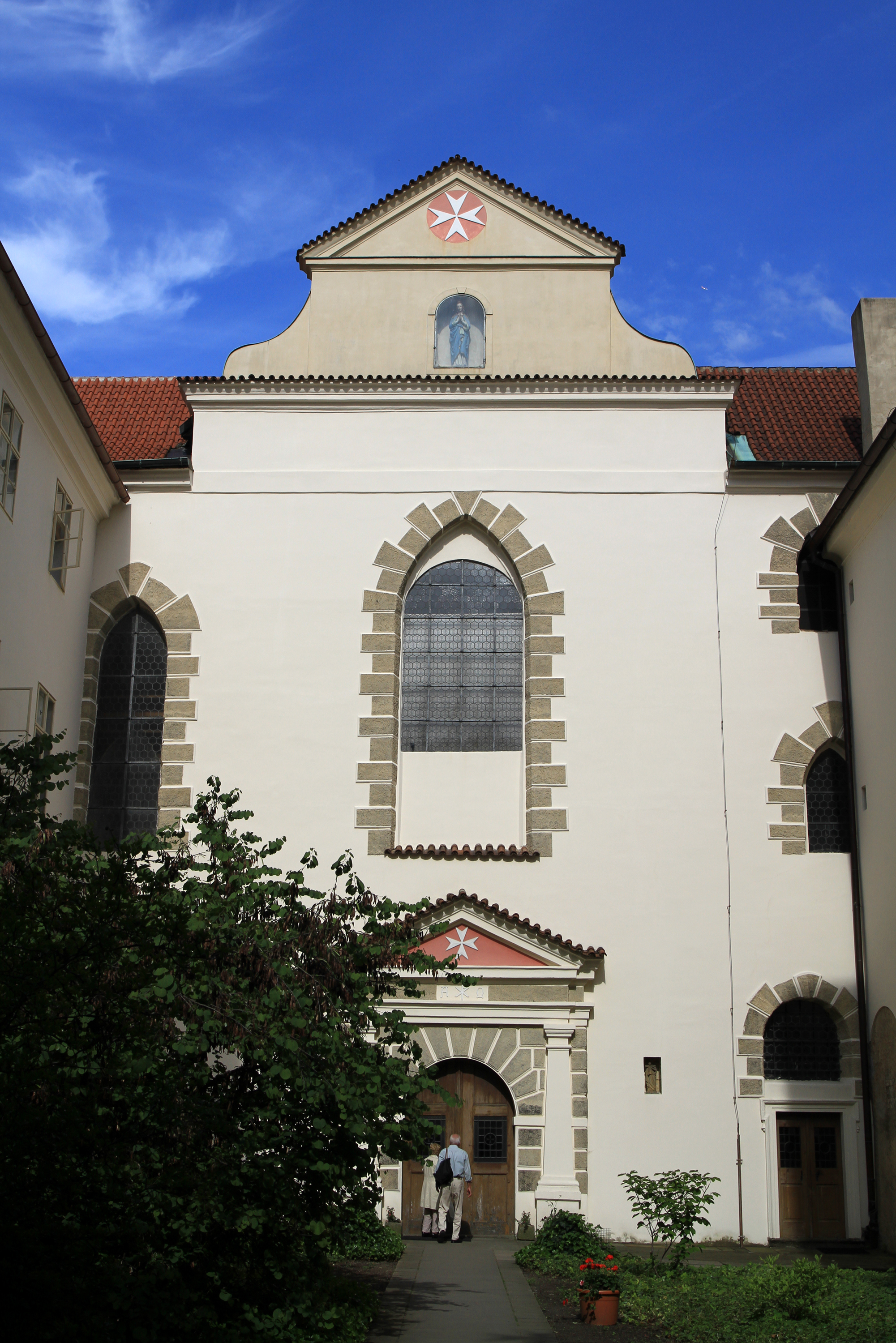 Komenda řádu Maltézských rytířů (Malá Strana), Praha 1-Malá Strana, Velkopřevorské náměstí 485/4, 608/5a, 489/6, Lázeňská 482/5, 485/2, 287/4, 286/6, Saská 286/5, Hroznová 489/3